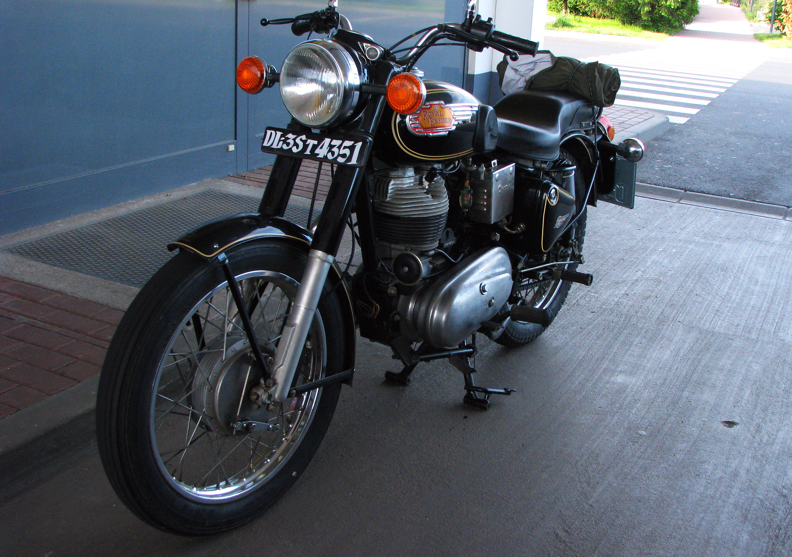 Royal Enfield Bullet 350 - voorzijde met nummerplaat uit Delhi India - Foto Wolfgang Pehlemann IMG_1287